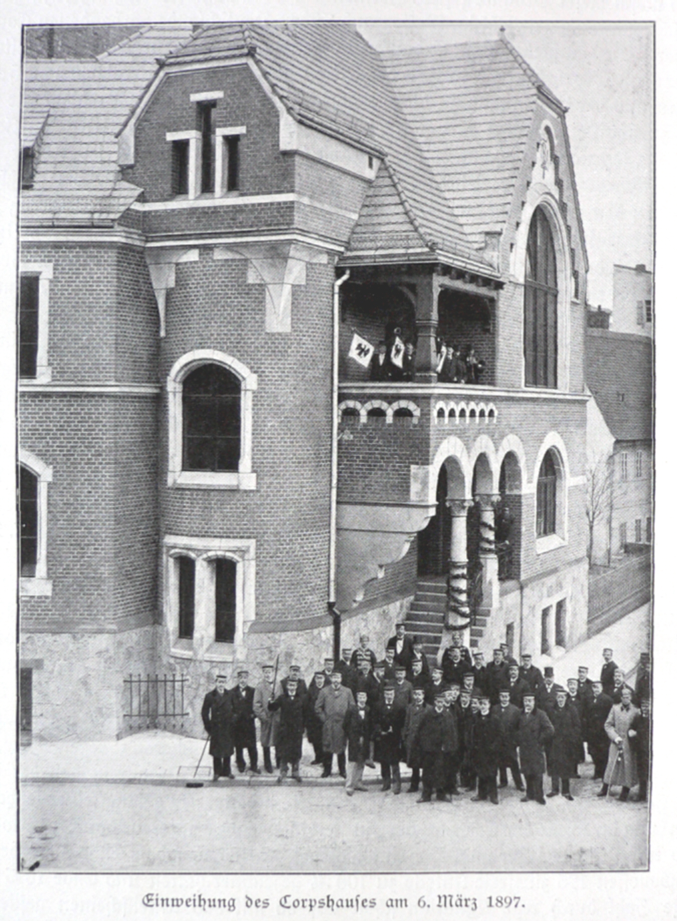 Einweihung des Corpshauses der Borussia Breslau